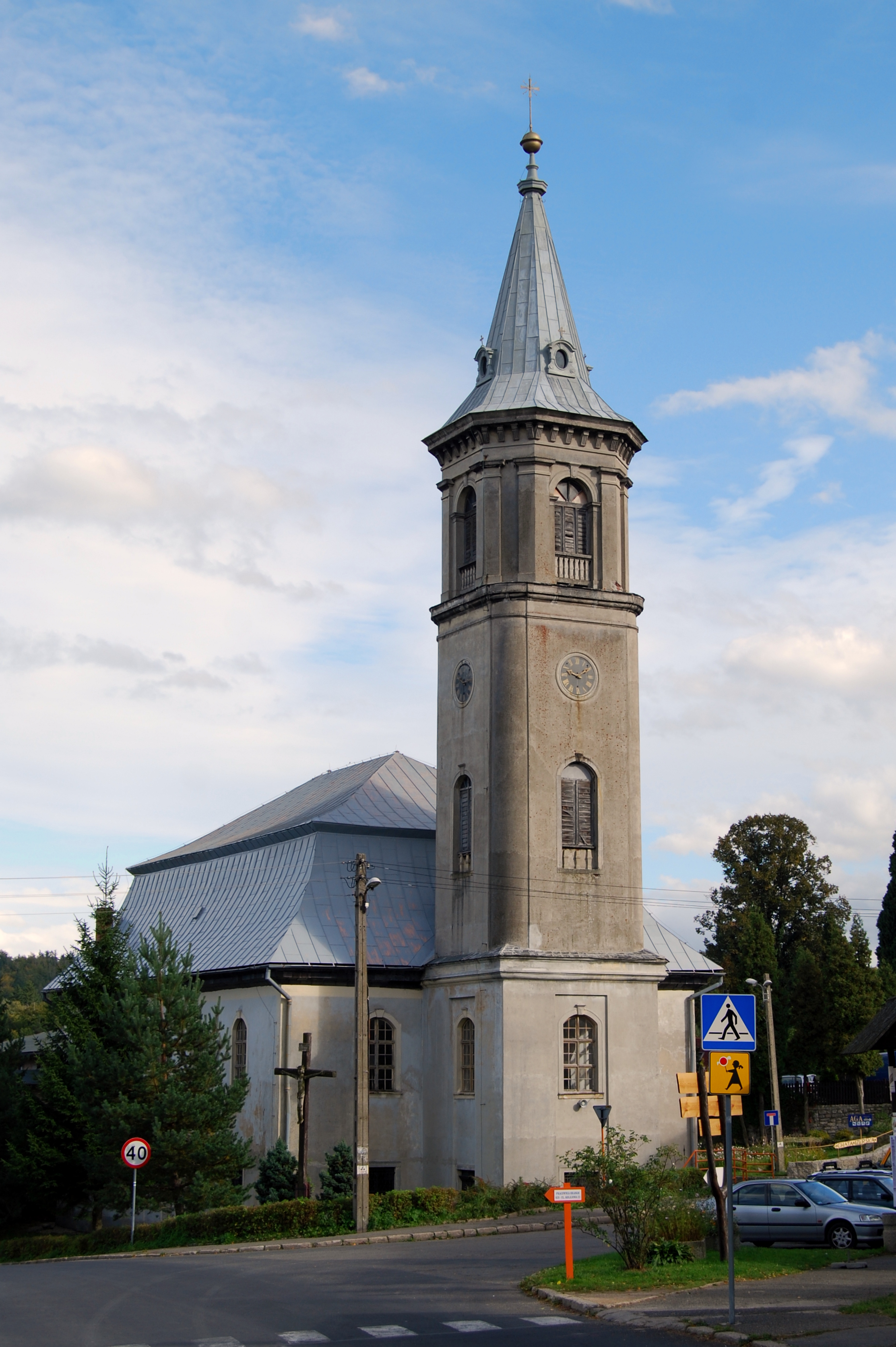 Kościół filialny Niepokalanego Serca NMP, d. ewangelicki w Szklarskiej Porębie przy ul. Piastowskiej